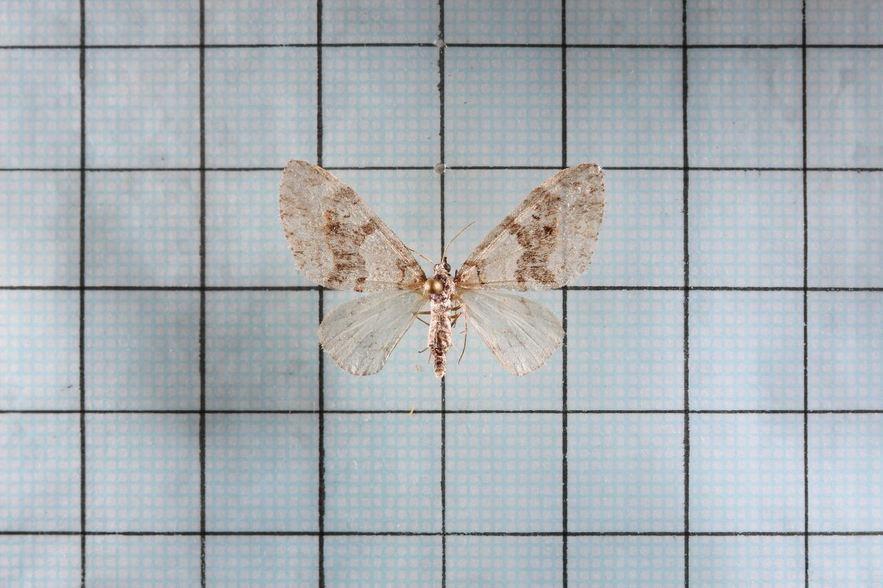 Esakiopteryx venusta Yazaki 雅夷尺蛾 鞍1:p.12-26